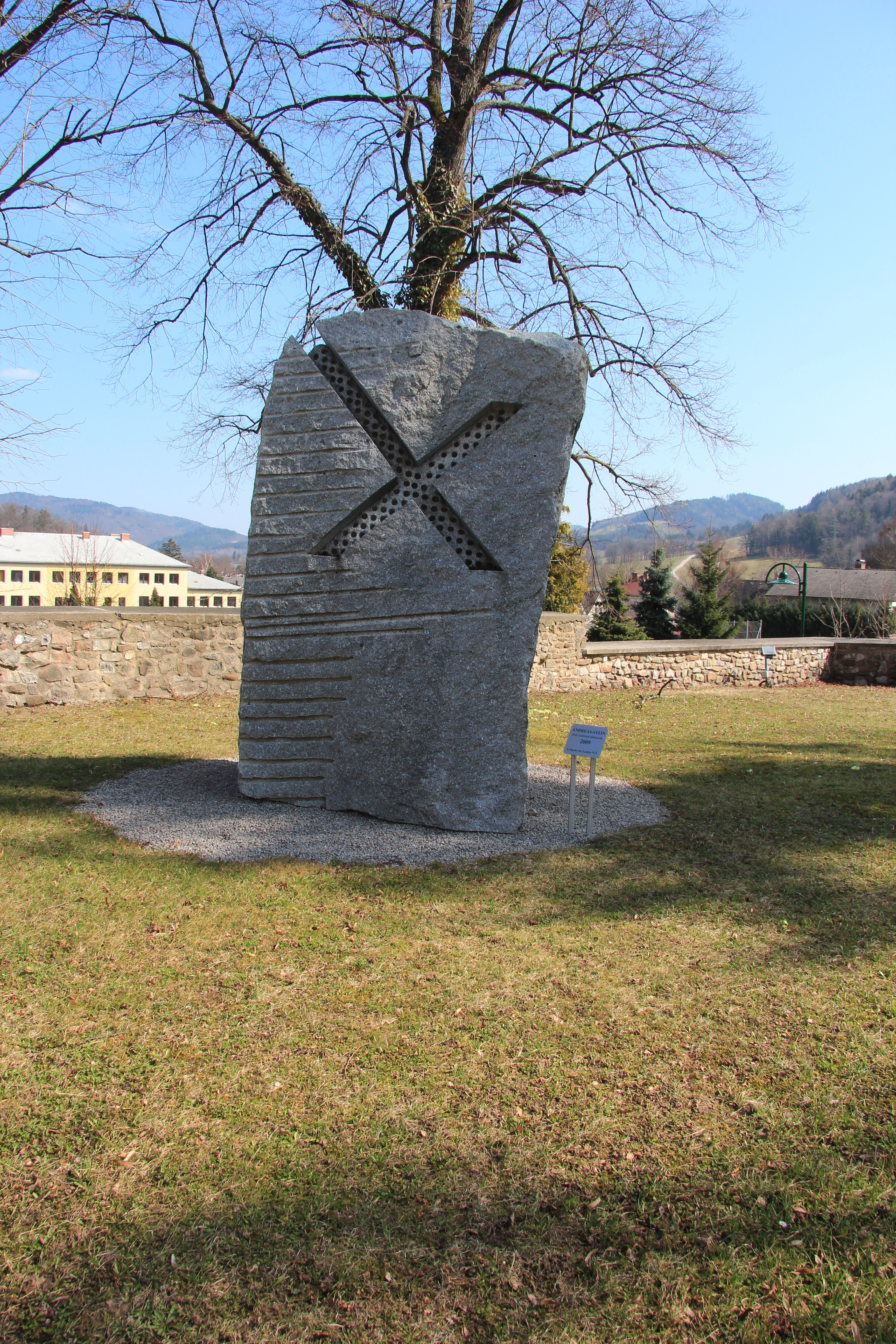 Andreaskreuz von Gottfried Höllwarth vor der Kirche in Hainfeld, Niederösterreich